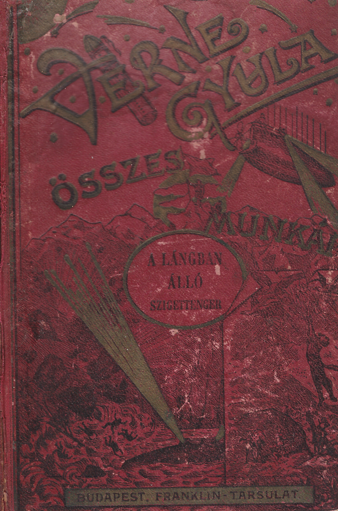 Verne műveinek régi magyar kiadása (1900-as évek eleje)